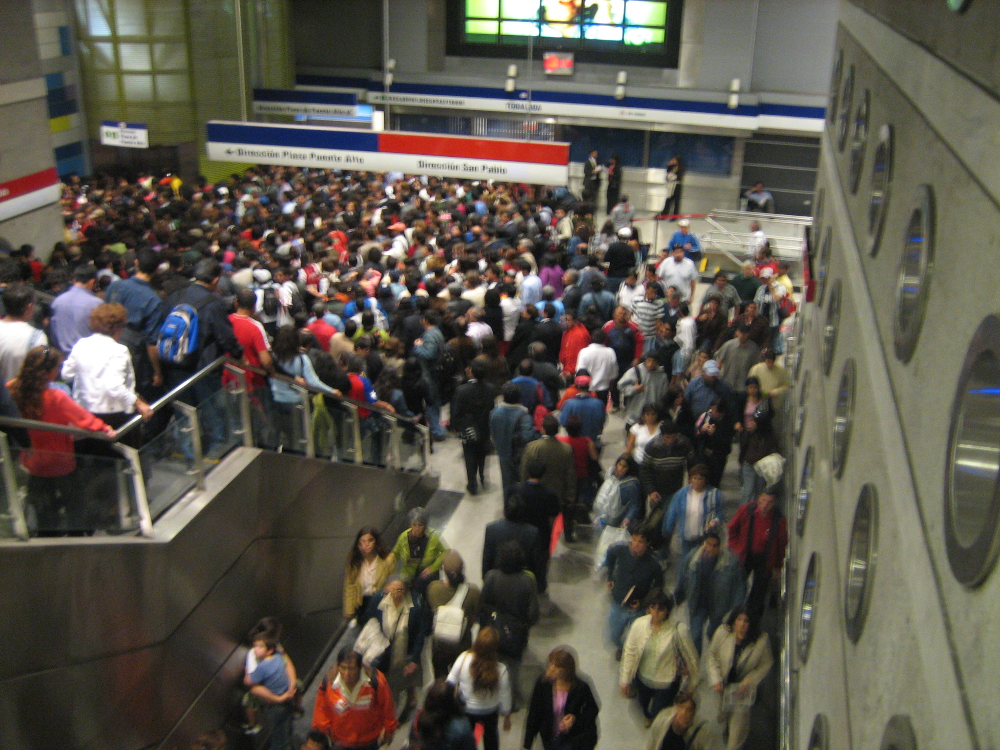 Estación Tobalaba, transbordo entre las líneas 1 y 4 del Metro de Santiago.